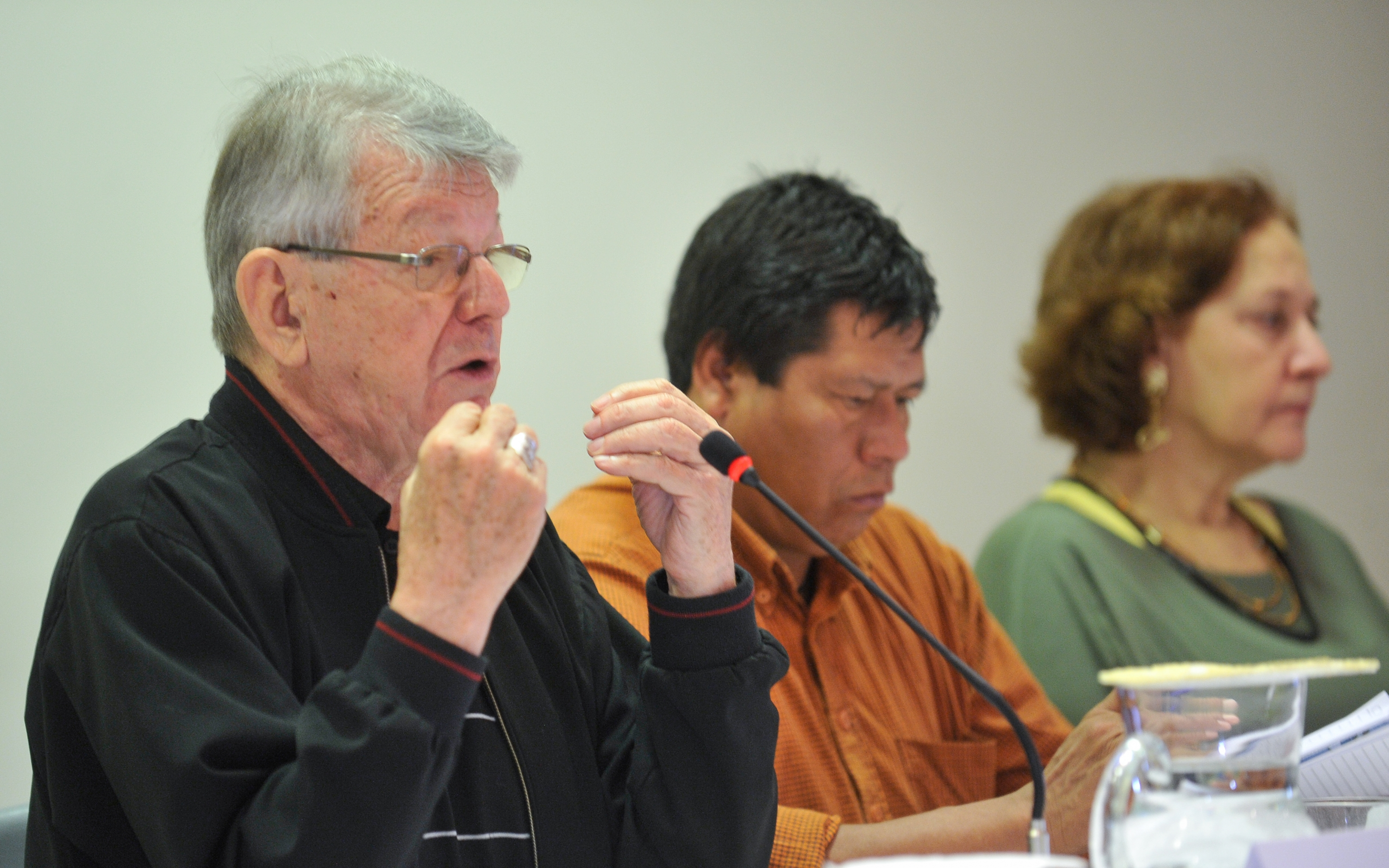 Brasília - O Conselho Indigenista Missionário (Cimi) lança o relatório Violência Contra os Povos Indígenas 2012.